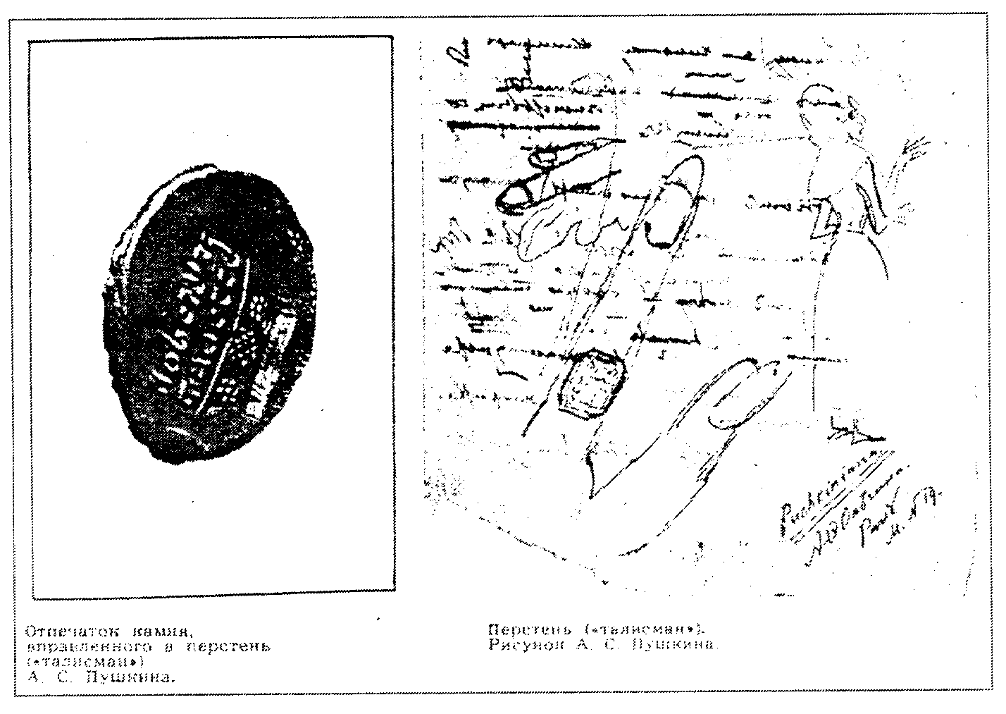 «Храни меня, мой талисман». Отпечаток камня, вставленного в перстень, и рисунок Пушкина, изображающий талисман.